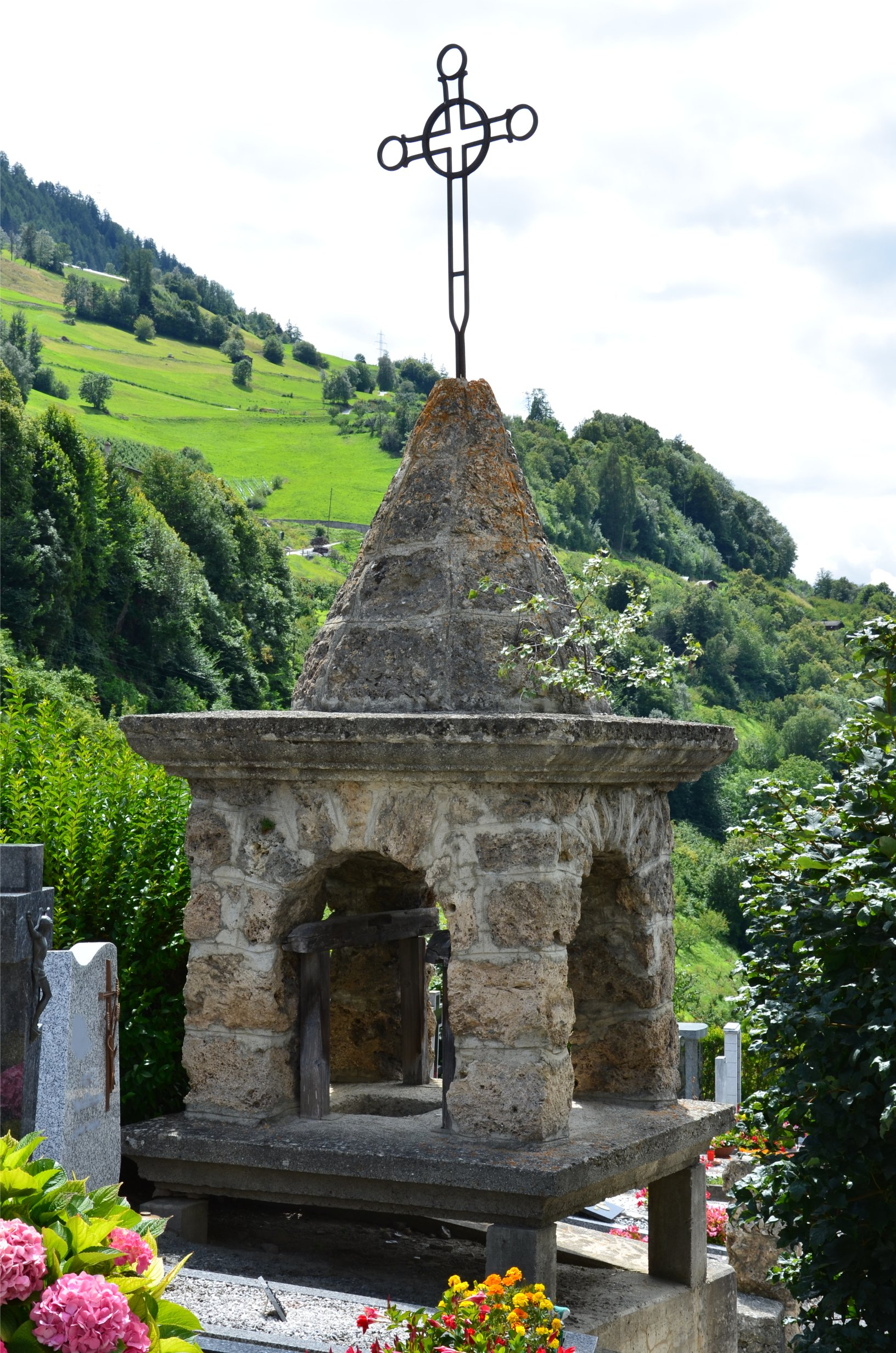 Clocher de l'ancienne chapelle de la Martenette, aujourd'hui trônant à l'entrée de l'actuel cimetière.